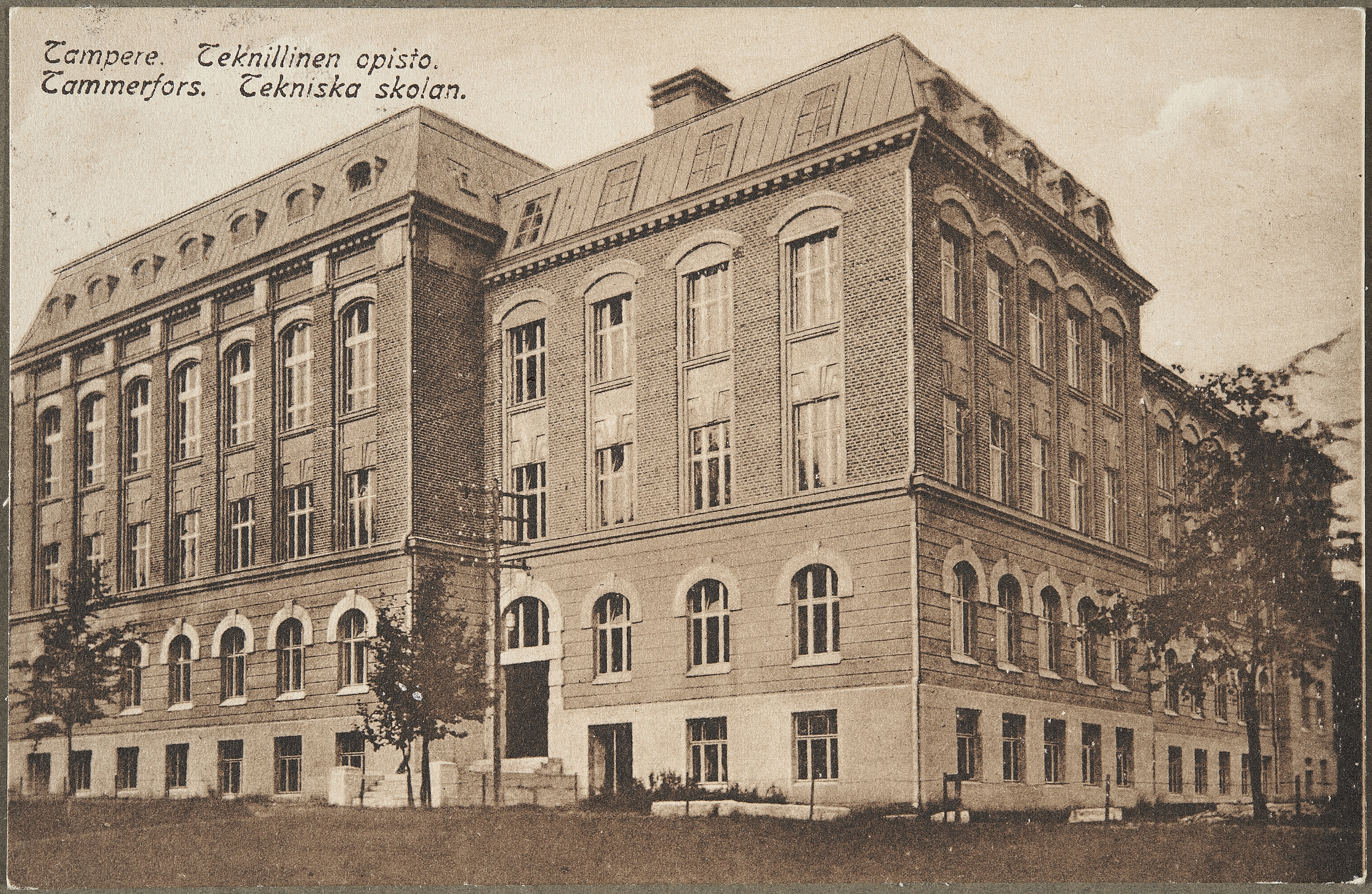 Kuvassa on Tampereen teknillinen opisto. Rakennuksen suunnitteli arkkitehti Richard Björnberg, ja se valmistui 1915. Myöhemmin (vuodesta 1923 alkaen) talo tunnettiin nimellä Tampereen teknillinen oppilaitos. Rakennusta on laajennettu 1930-luvulla.